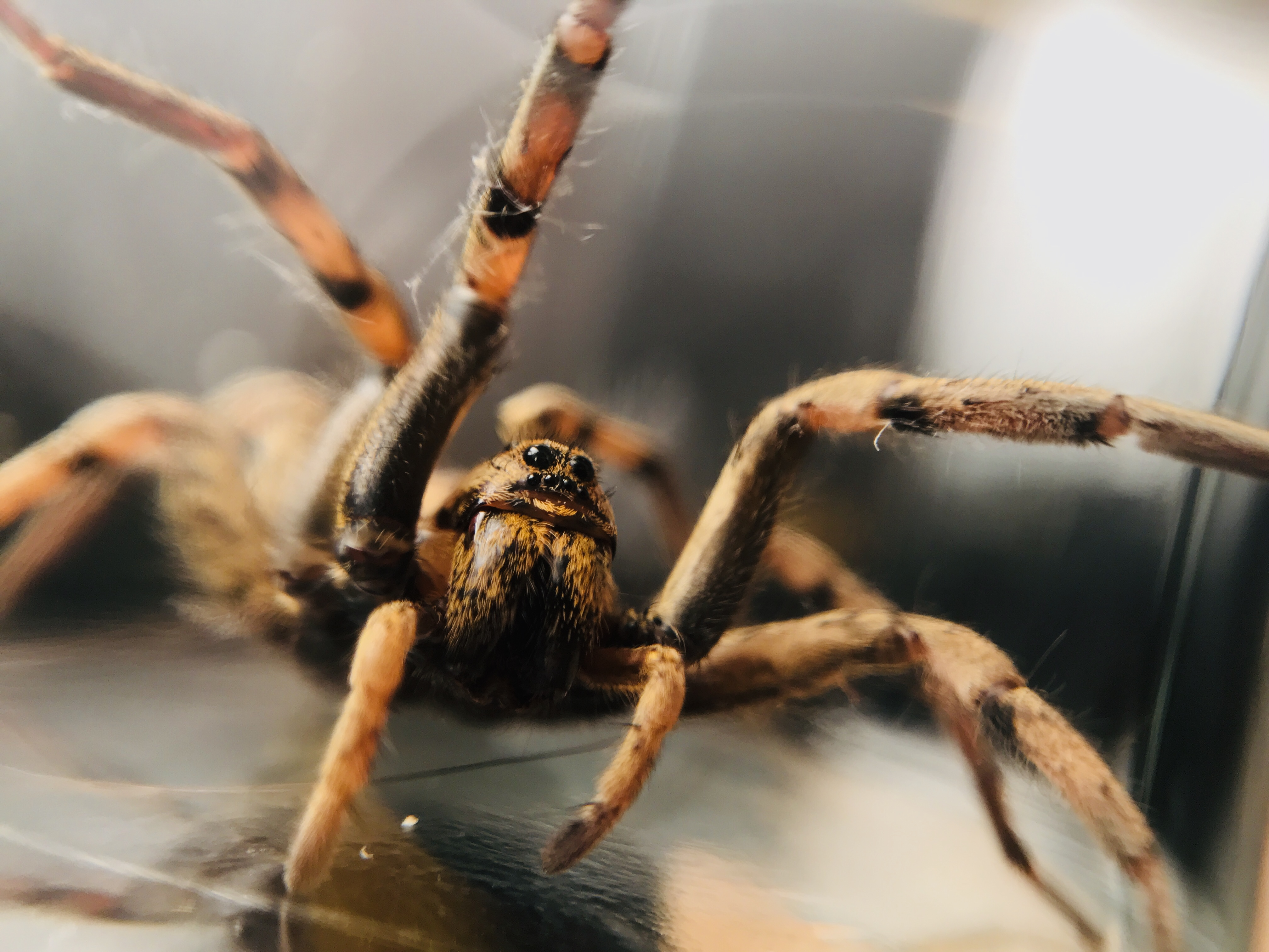 Photo d'une Lycosidae (vue de face)